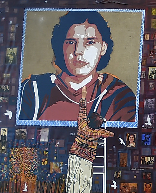 Gobierno de Chile: Presidenta Michelle Bachelet participa en la inauguración del Mural sobre Orlando Letelier.